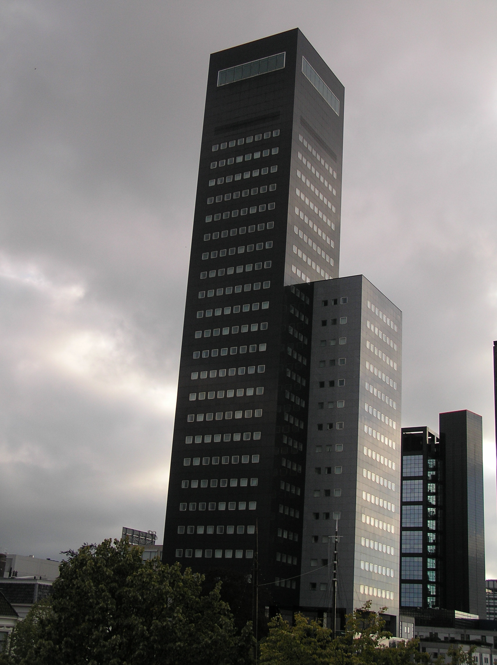 Achmeatoren, Leeuwarden